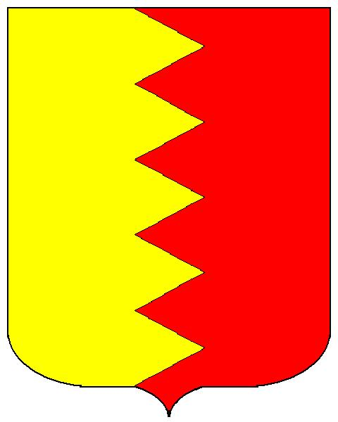 Grb obitelji Ćipiko